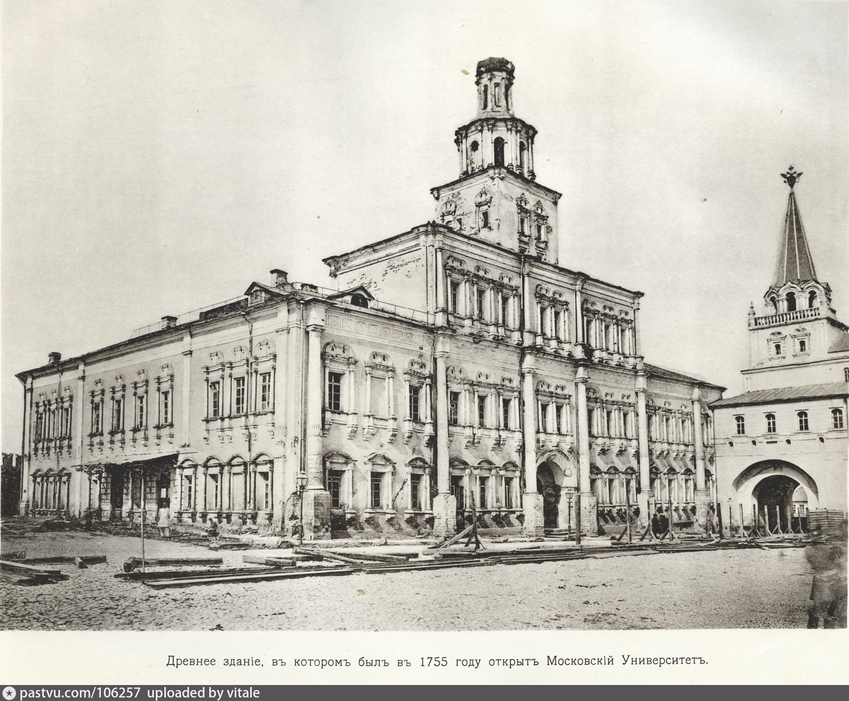 Первое здание Московского университета «Аптекарский дом» (снесён в 1875 году)